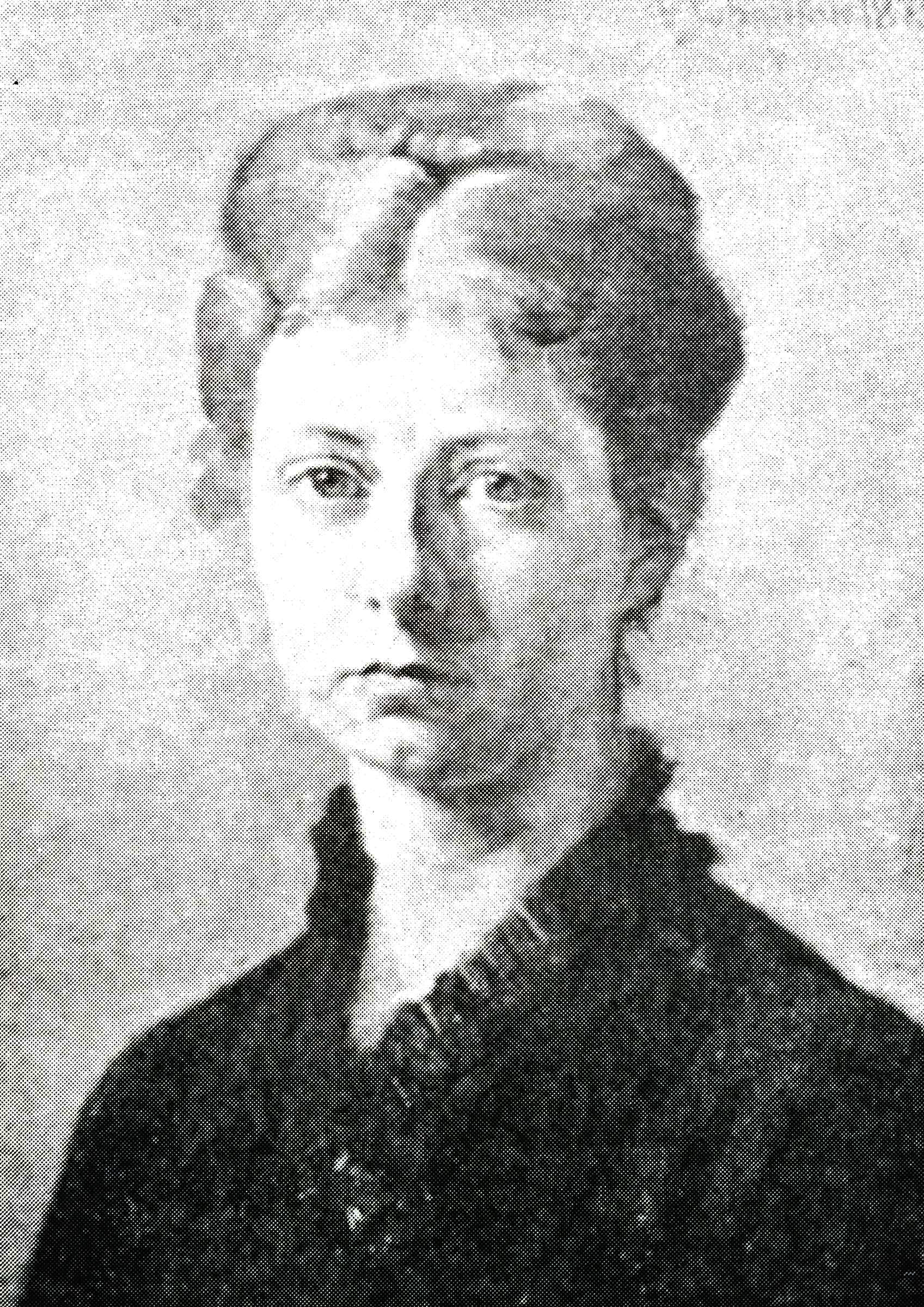 Affotografering af portræt af Helga Johansen, malet af Viggo Johansen. Fra udgivelsen "Hinsides" udgivet under pseudonymet "Hannah Joël" i 1900. Genudgivet i 2013 på Forlaget Gladiator.